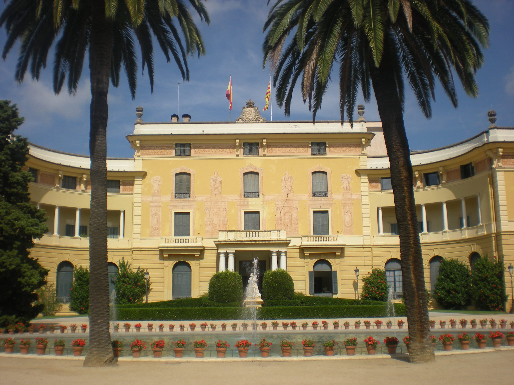 Palau de Pedralbes (Barcelona)